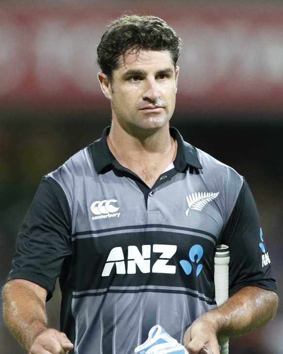 Colin de Grandhomme